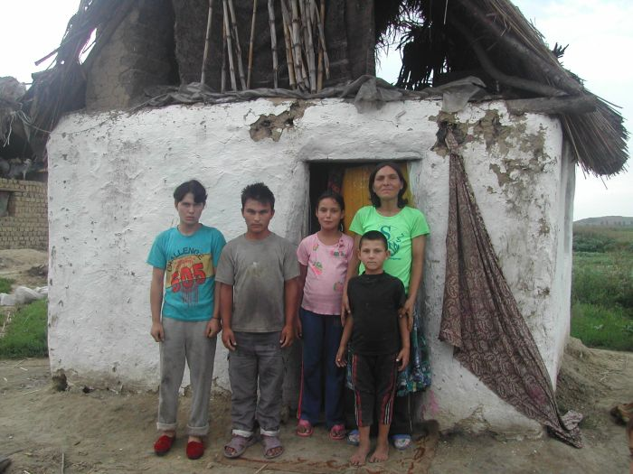 Romafamilie (? niet zeker...) in West Roemeens dorp voor hun huis 2006